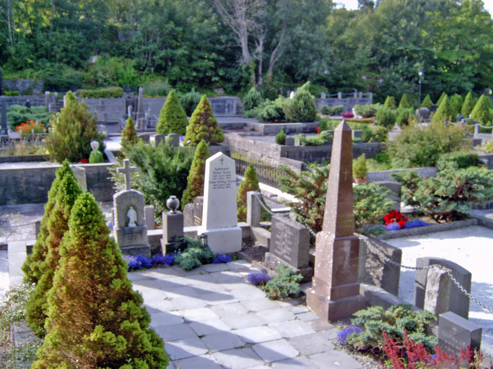 Cemeteries in Norway, Kirkelandet, Kristiansund